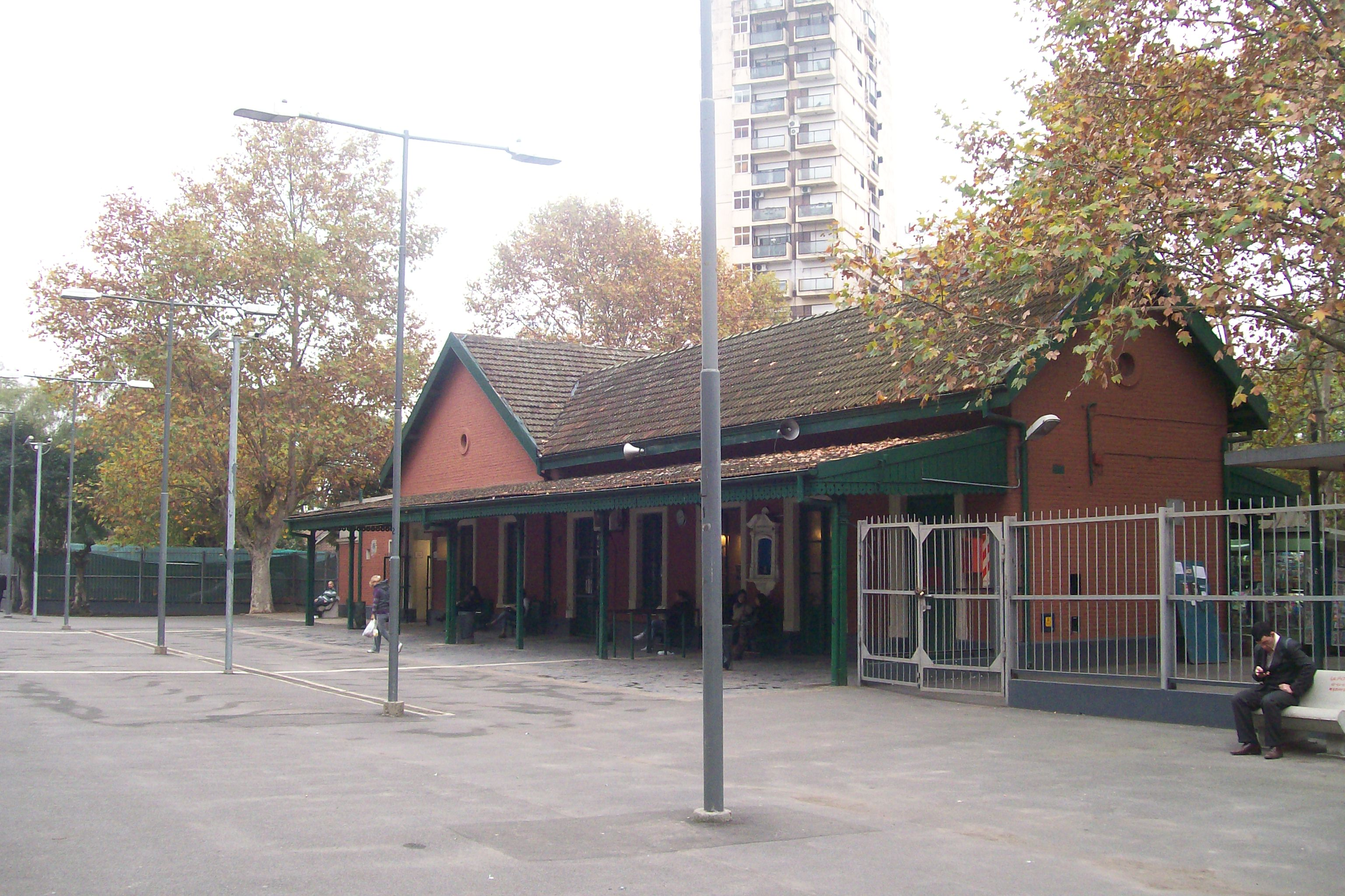 Estacion de Santos Lugares andén hacia Retiro